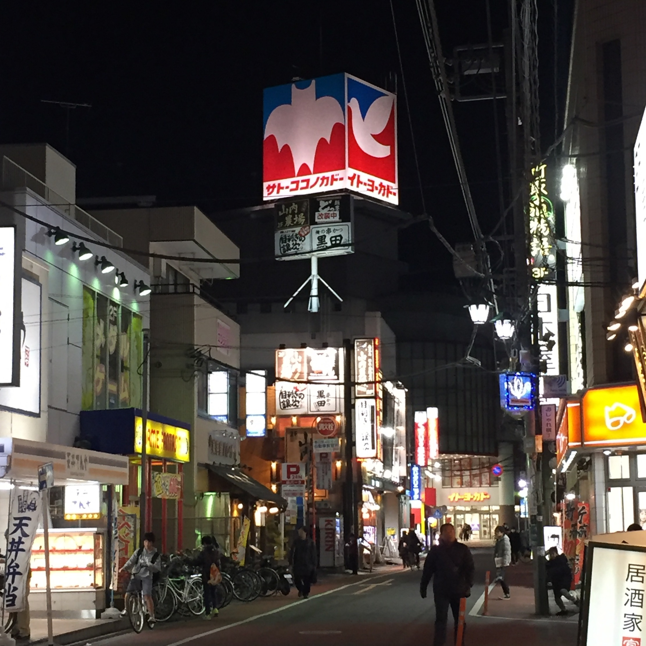 一時的に「サトーココノカドー」(漫画作品「クレヨンしんちゃん」の架空のスーパー)の看板も掲げた、イトーヨーカドー春日部店の遠景。